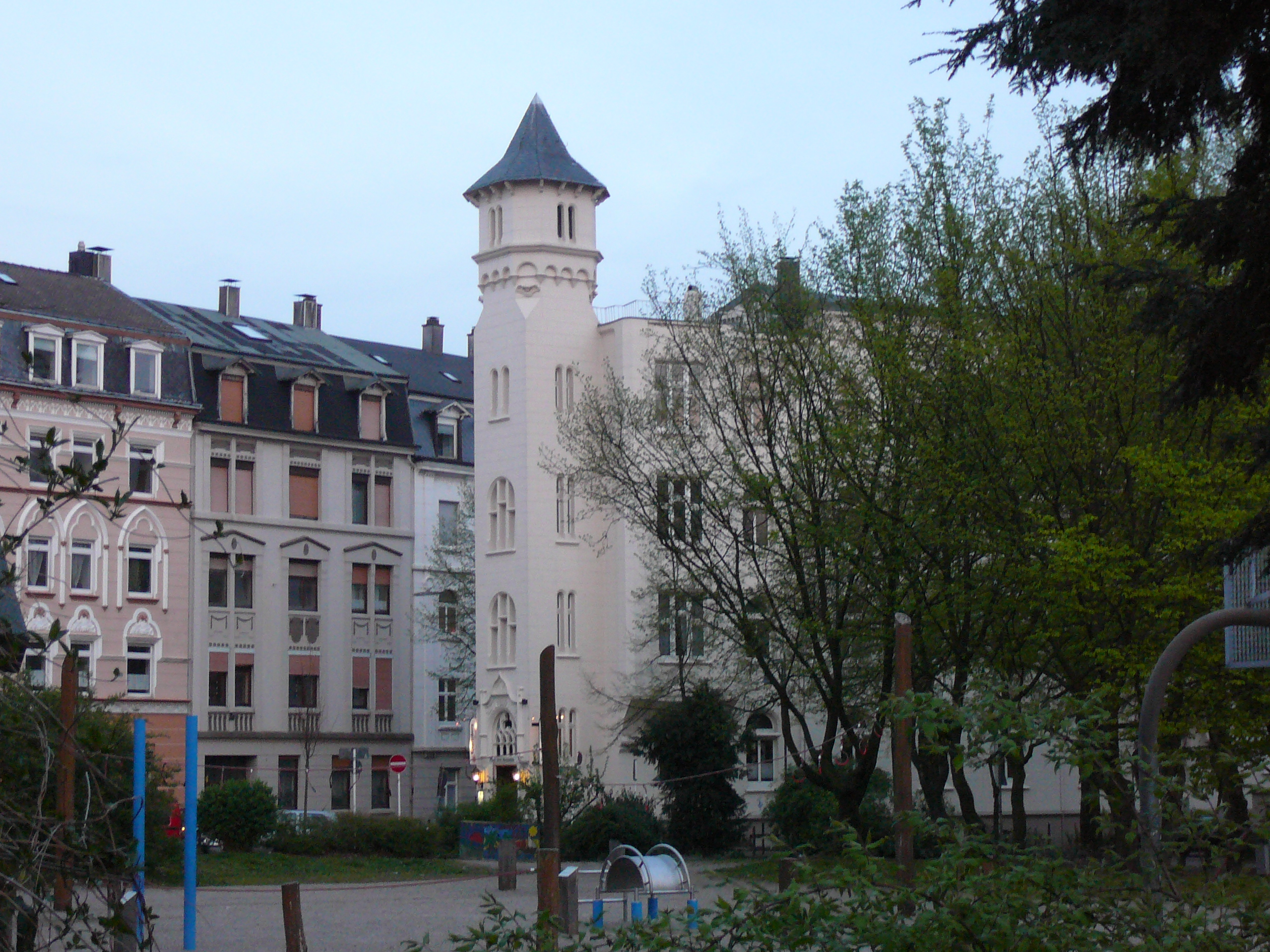 Platz der Republik, Wuppertal